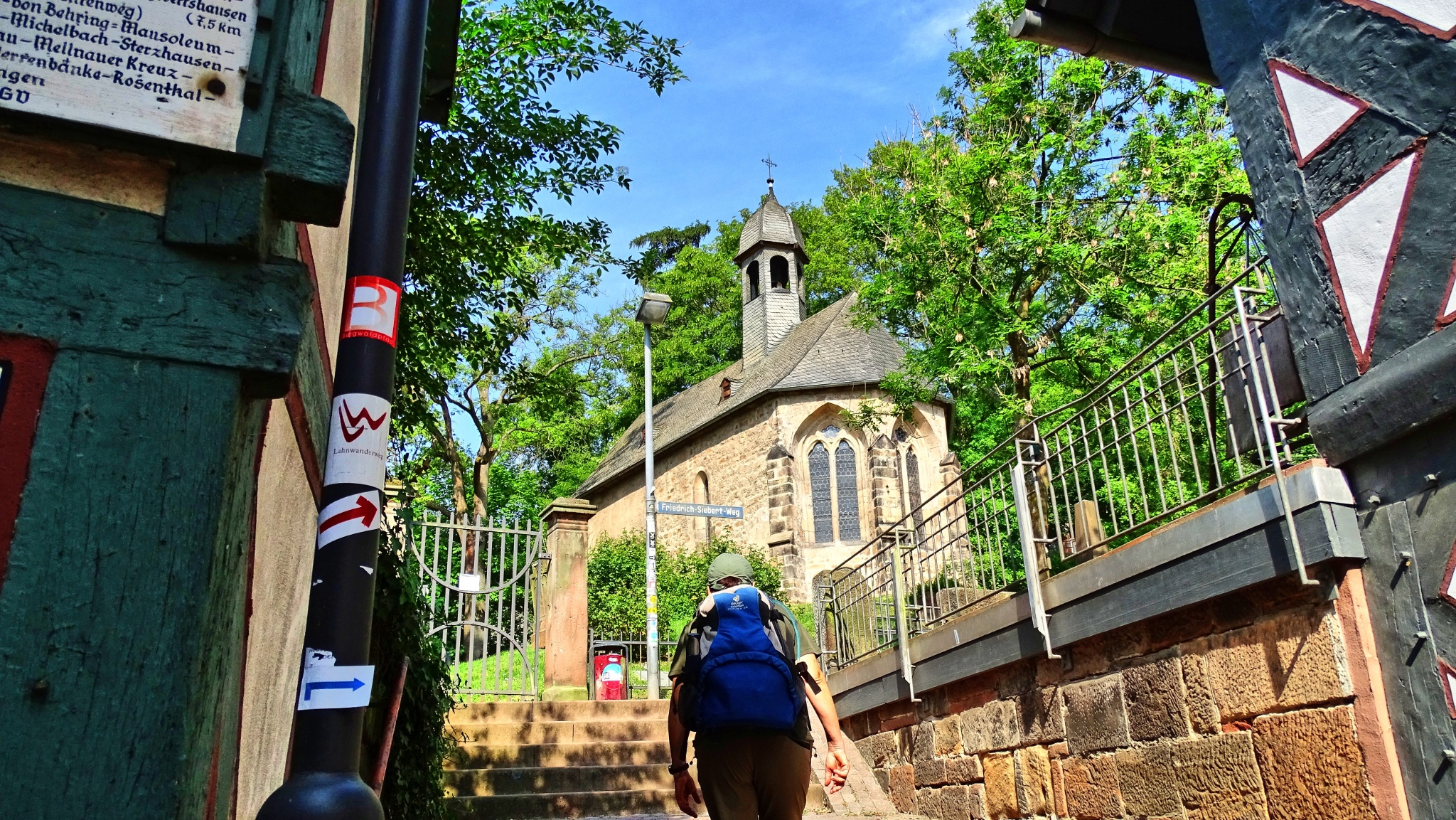 Aufstieg auf dem Lahnwanderweg, hier verlaufend auf dem Friedrich-Siebert-Weg, zur St. Michaelskapelle in Marburg (Hessen, Deutschland). Blick in Richtung Nordwesten.